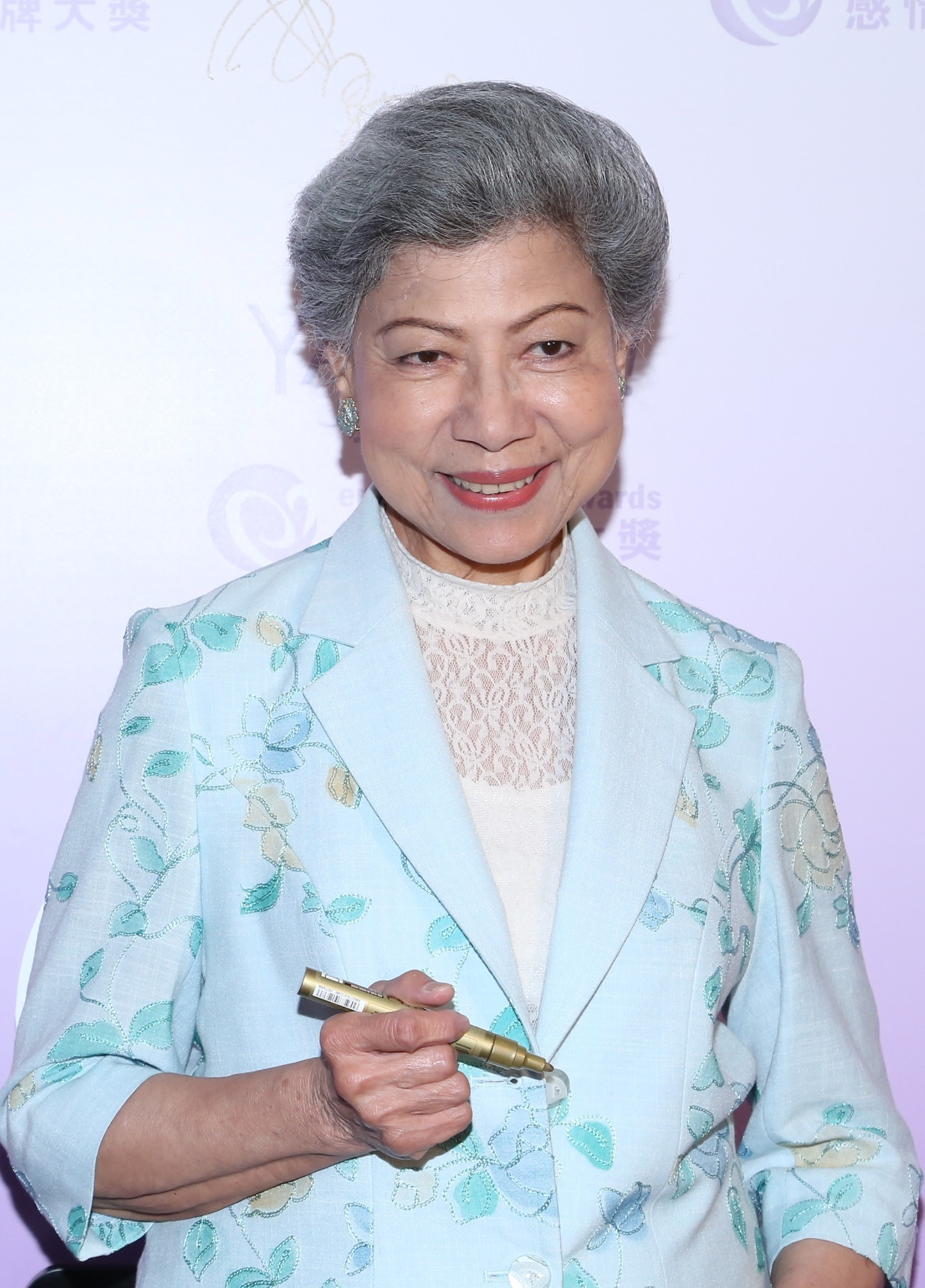 中文（香港）: 第19屆香港電影金像獎最佳女主角